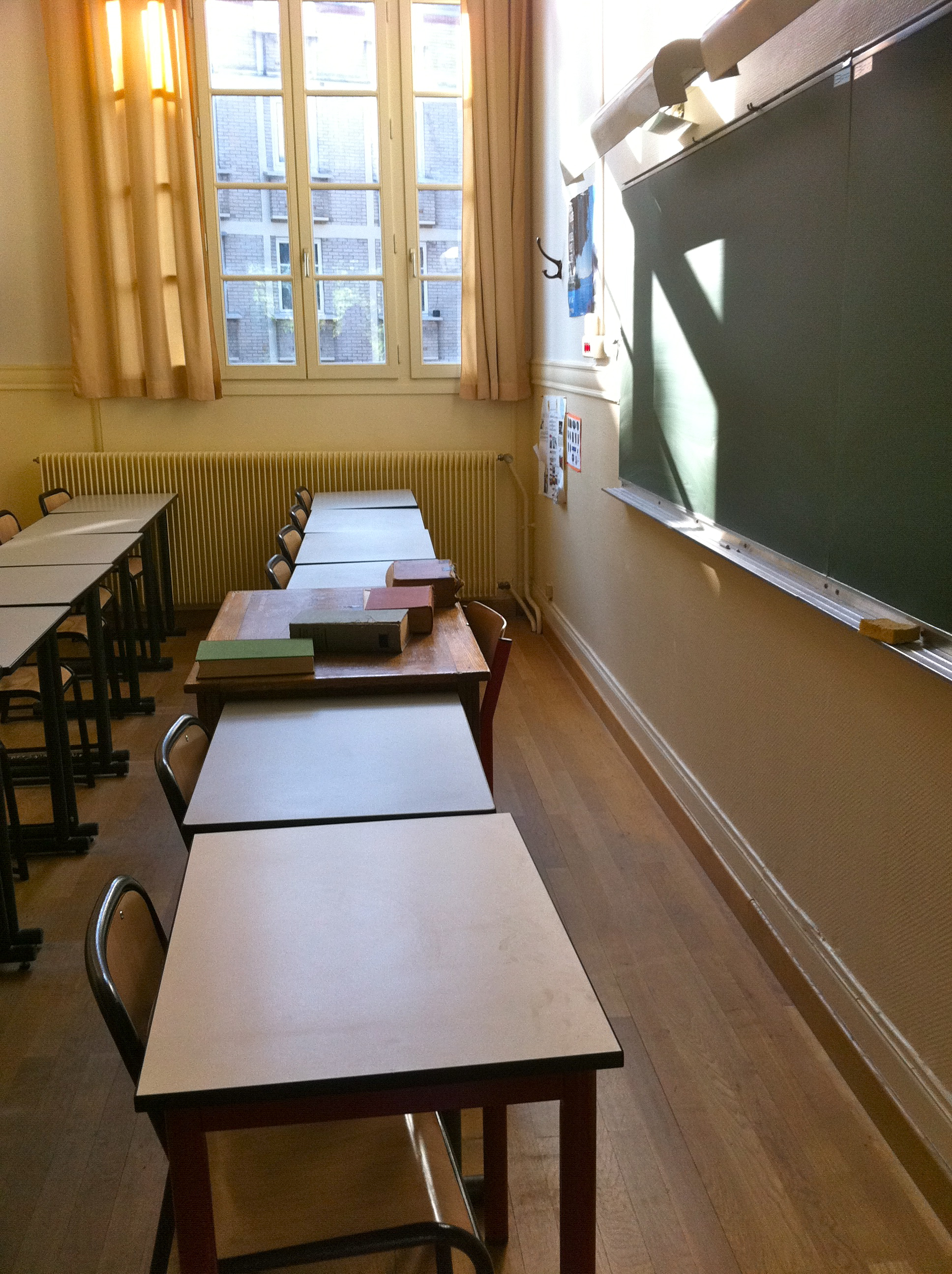 Salle de classe du lycée Molière (Paris)